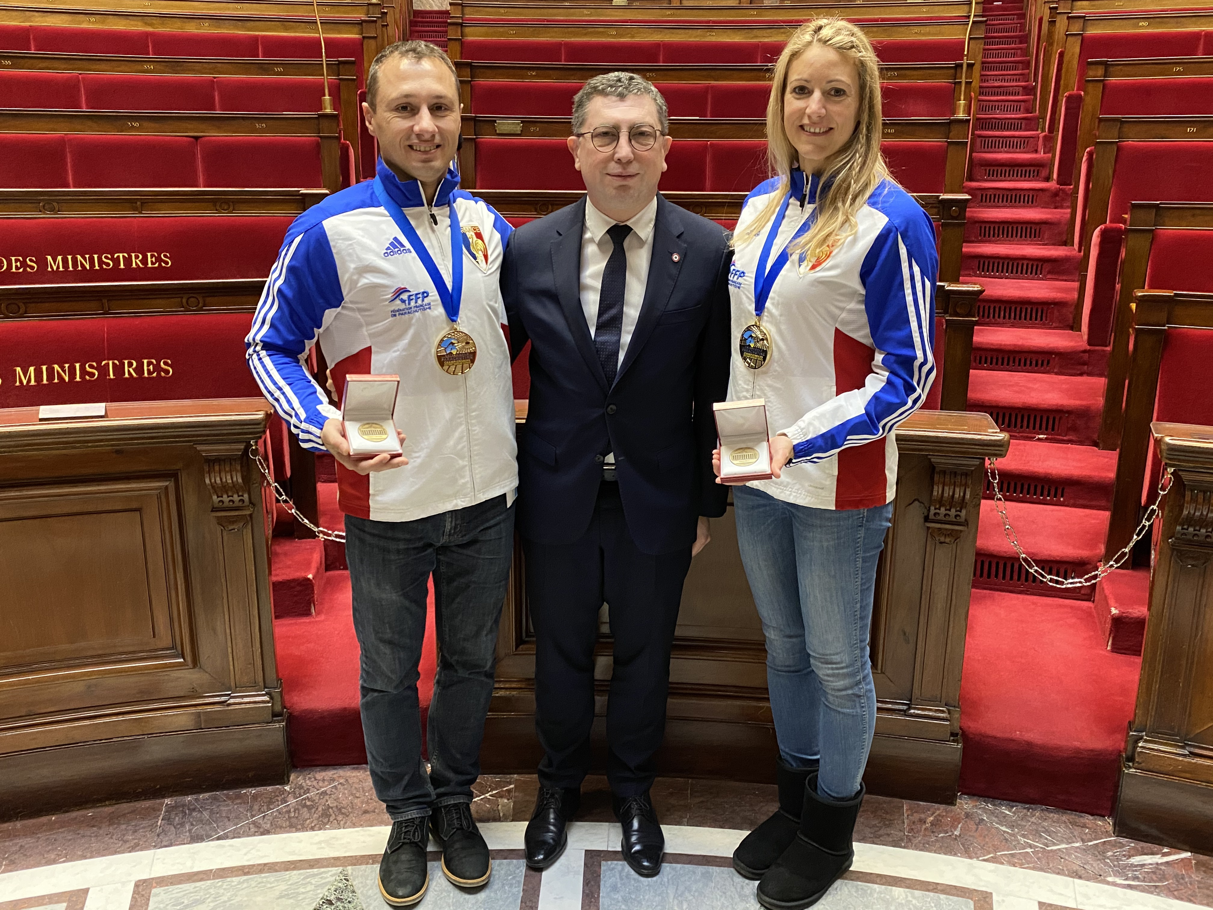 Distinction d'honneur accordée par le député Jean-Michel Mis aux 2 Champions du Monde natifs de la Région Rhônes-Alpes.